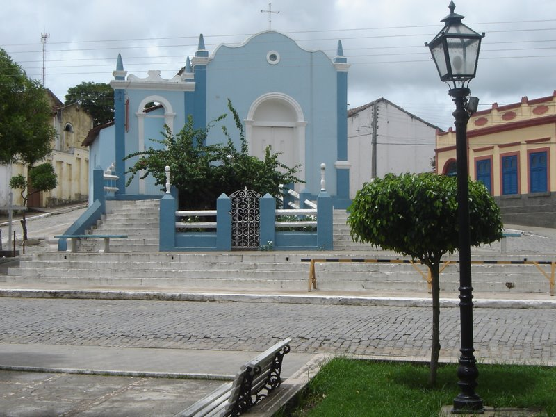 Igreja do rosario, Viçosa Alagoas.